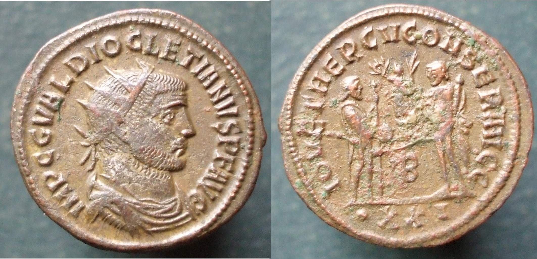 antoninien Dioclétien Concordia